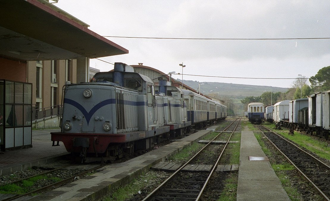 Treno trainato dalle locomotive LDe 609 e 611 delle Ferrovie della Sardegna in sosta a Macomer